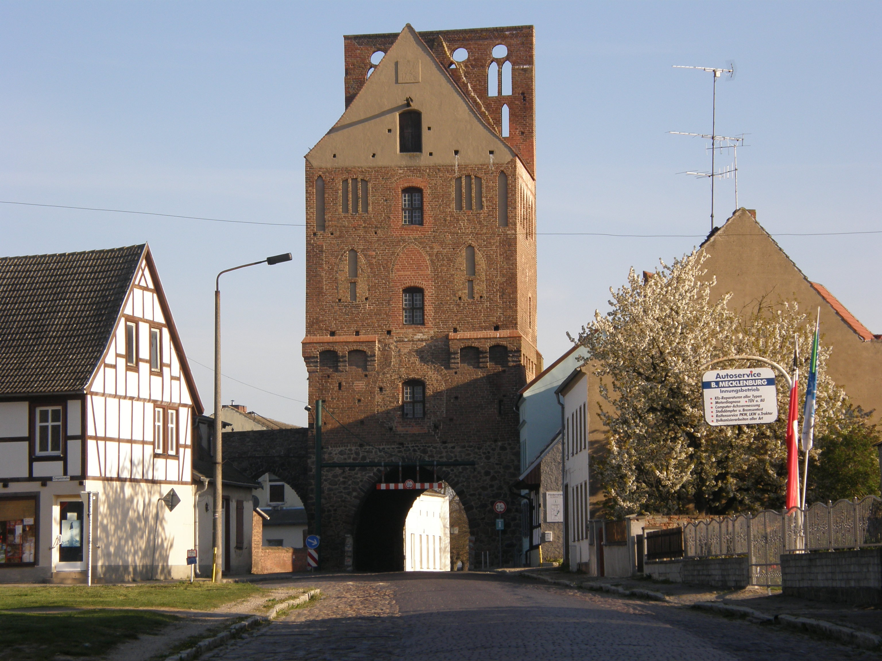 brama wjazdowa do Gartz